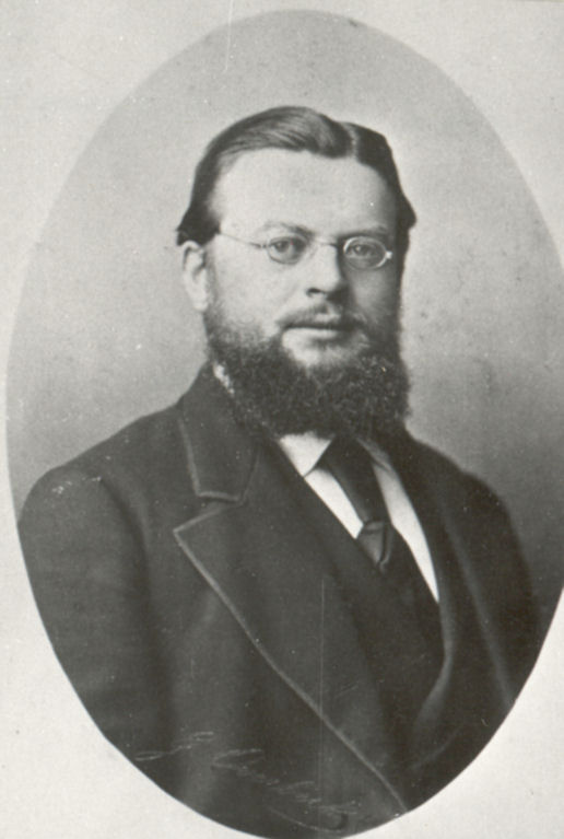 Portrait des Kaufmanns Carl Bergmann (* 25. Februar 1846; † 28. Dezember 1909), von 1870 bis 1883 Inhaber der Firma Carl Bergmann & Cie., Hilden, von 1883 bis 1909 Mitinhaber der Gesellschaft für Baumwoll-Industrie, Düsseldorf bzw. Hilden